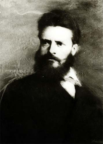 Der bulgarische Dichter und Freiheitskämpfer Christo Botew (1847-1876)